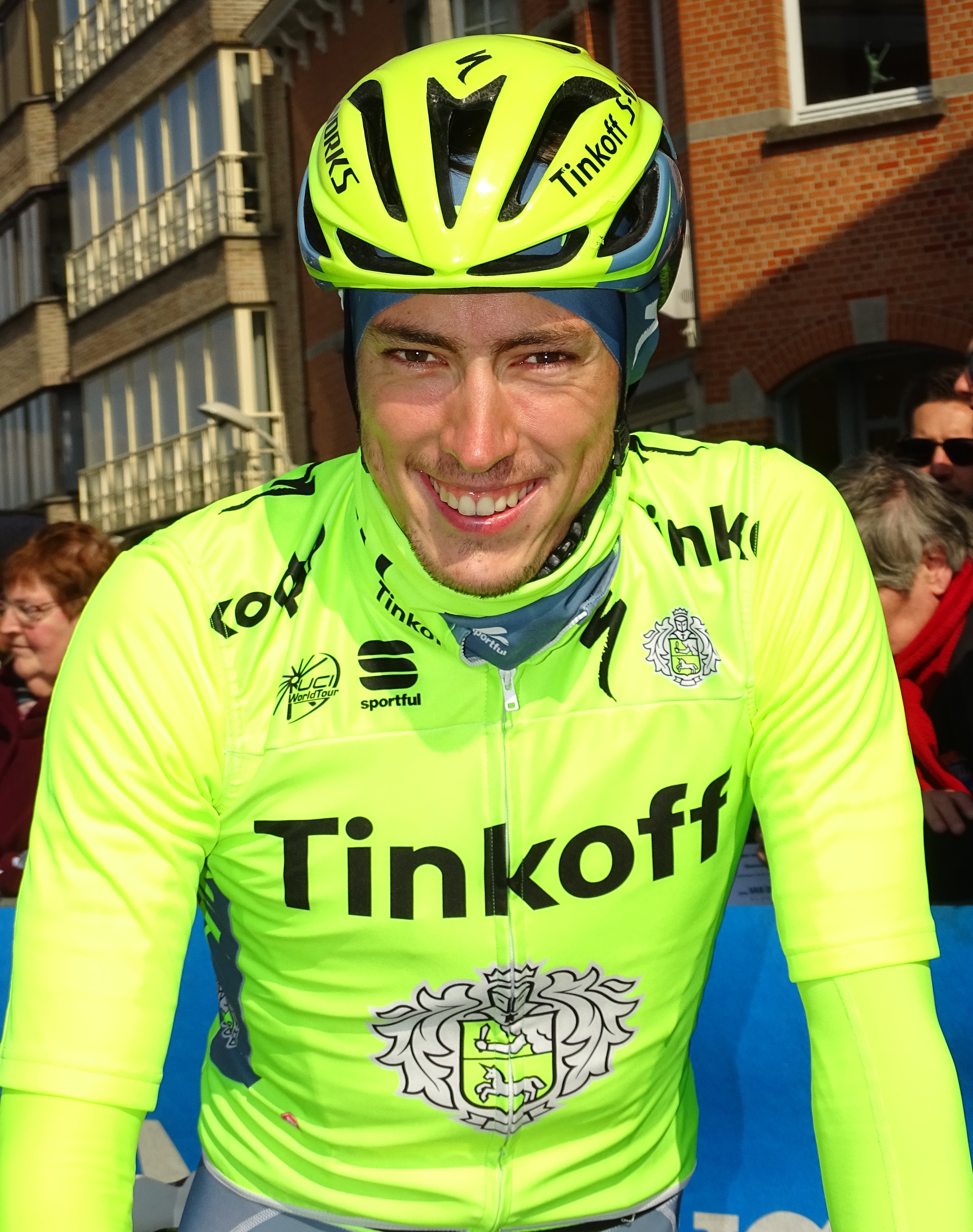 Reportage réalisé le mercredi 16 mars à l'occasion du départ de la Nokere Koerse 2016 à Deinze, Belgique.